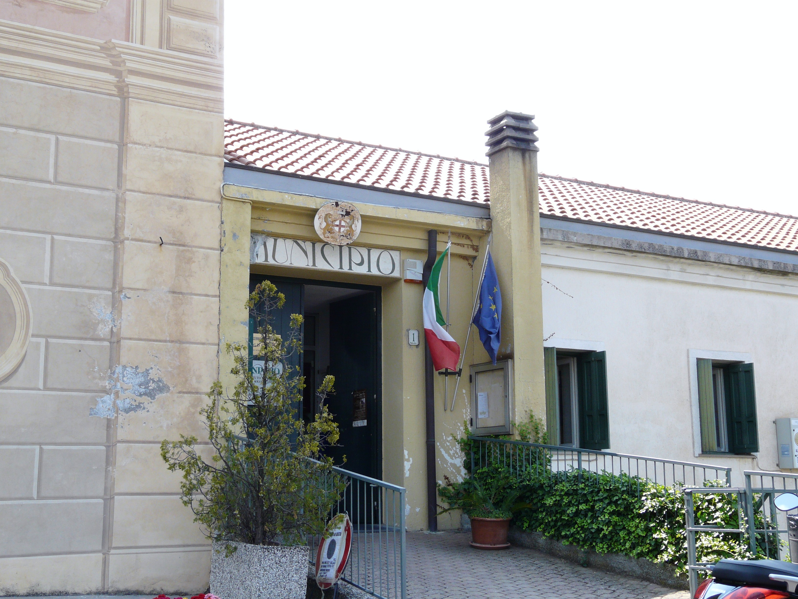 Municipio nuovo di Perinaldo, Liguria, Italia